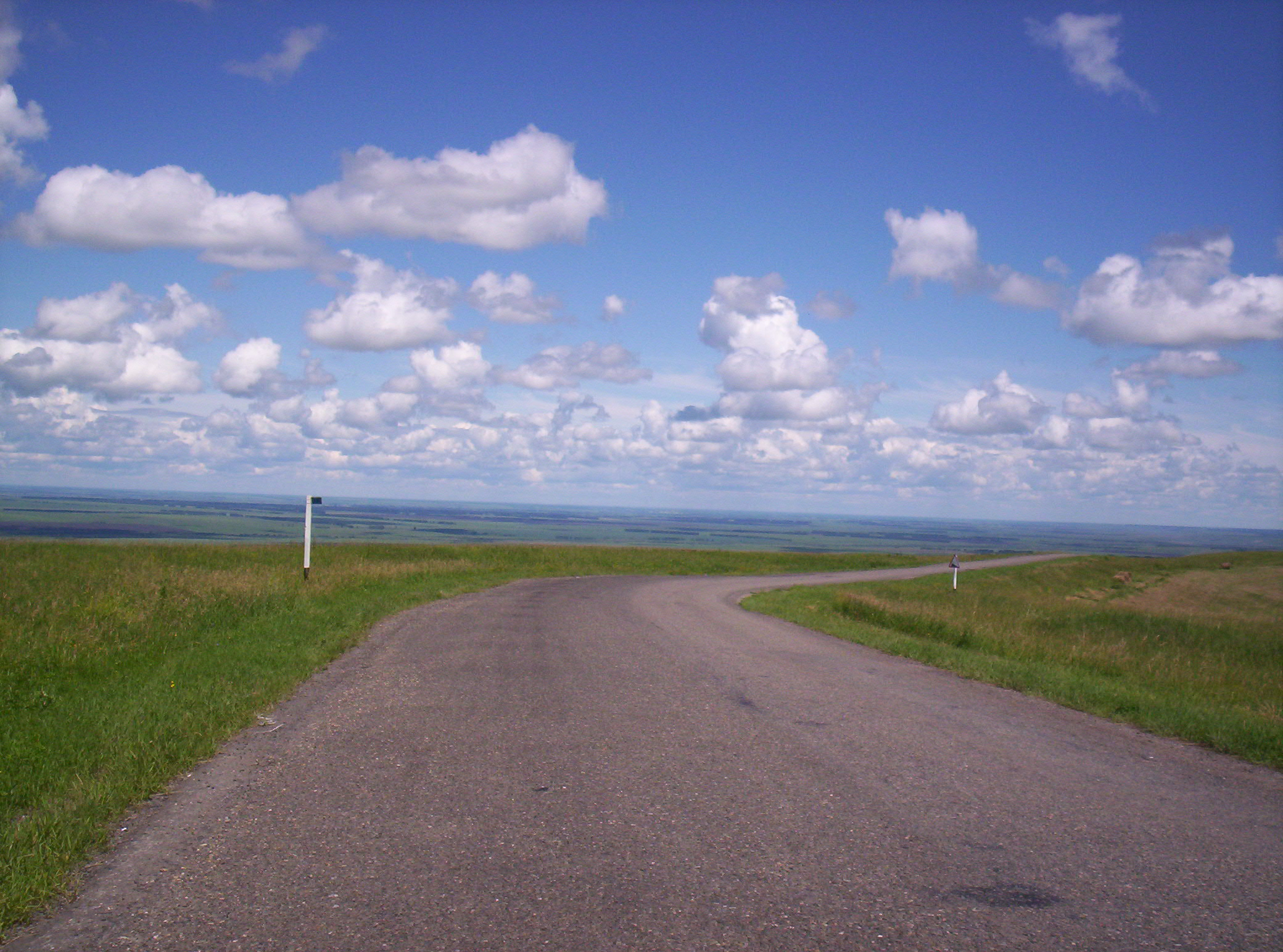 Смоленский район. Равнина. Вид с Алтайских гор.